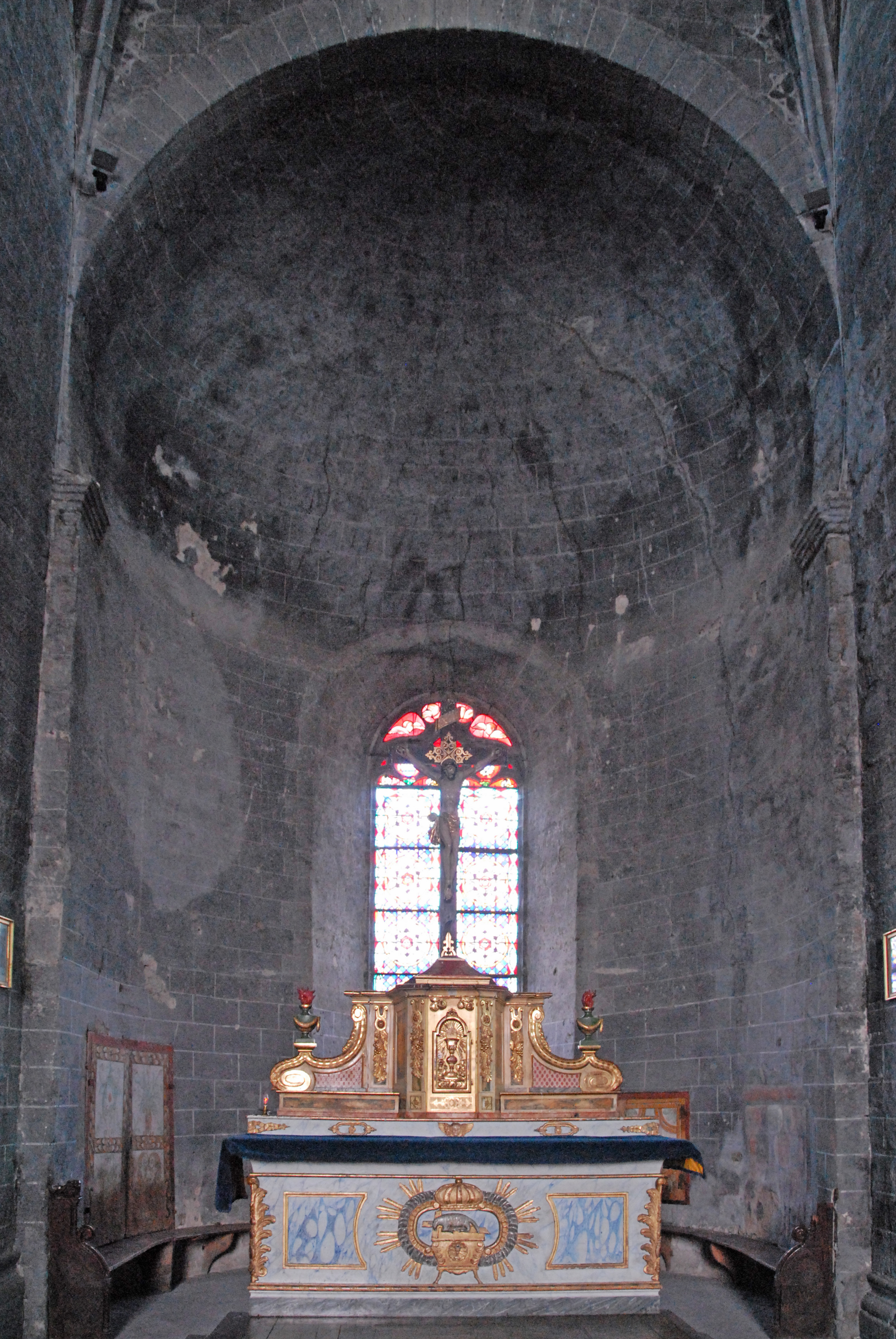 Chanteuges, Kirche, Chorapsis